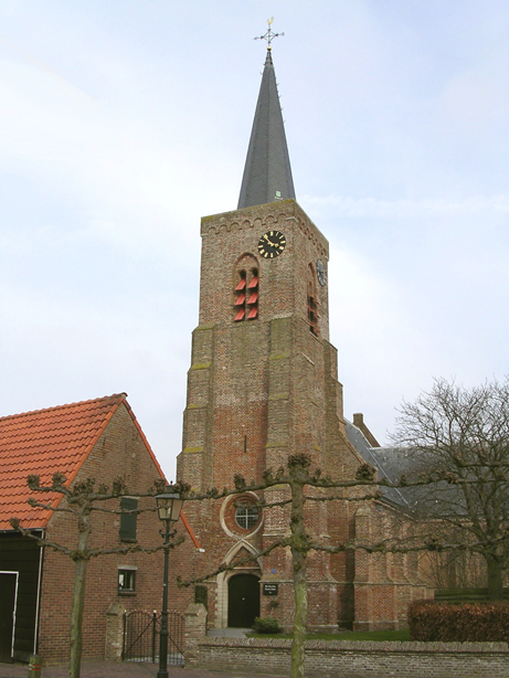 Deze foto maakte ikzelf op 3 maart 2006.